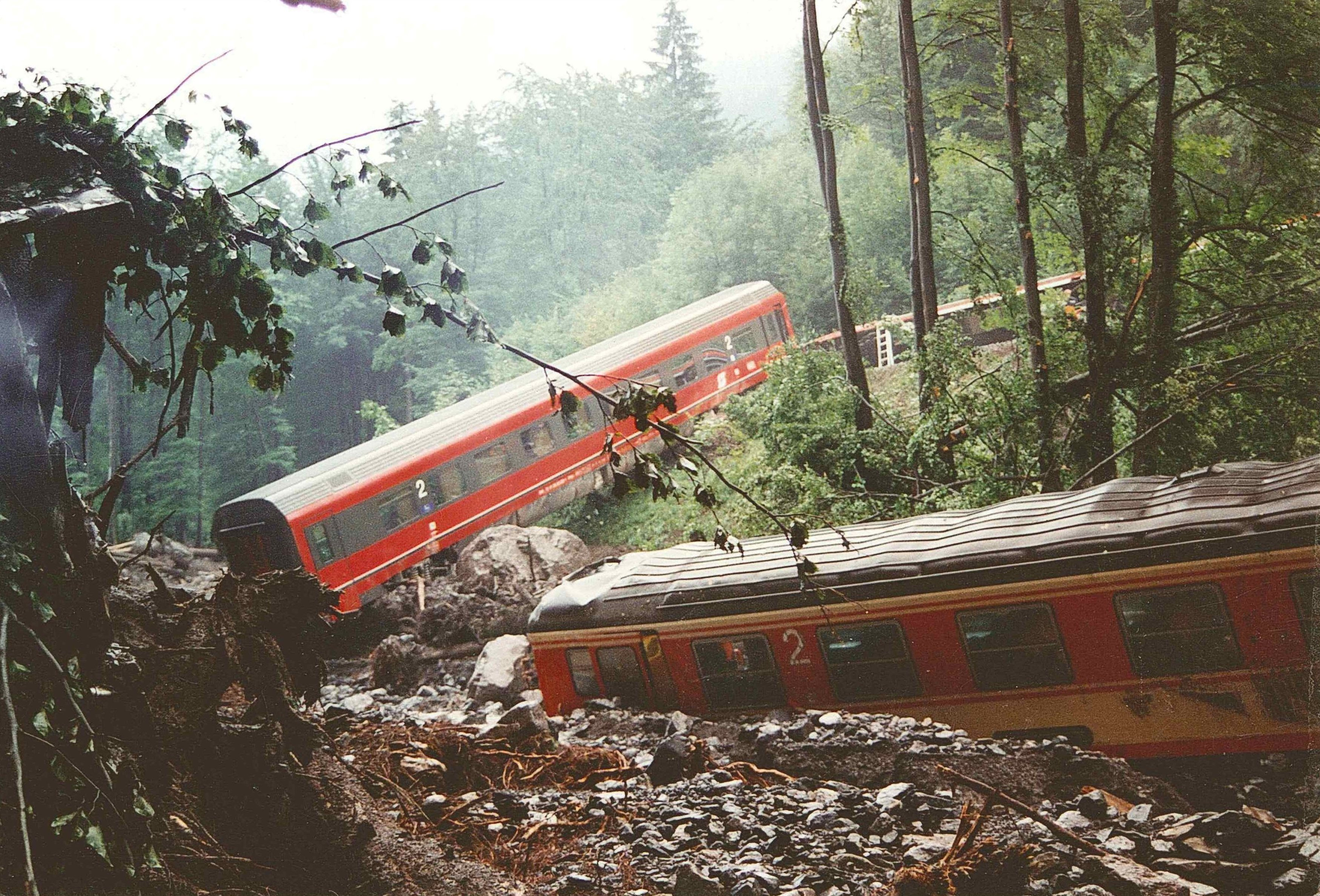 Absturzstelle im Masonbach beim Zugunglück von Braz 1995